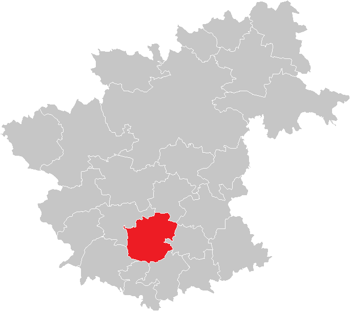 Bezirk Zwettl